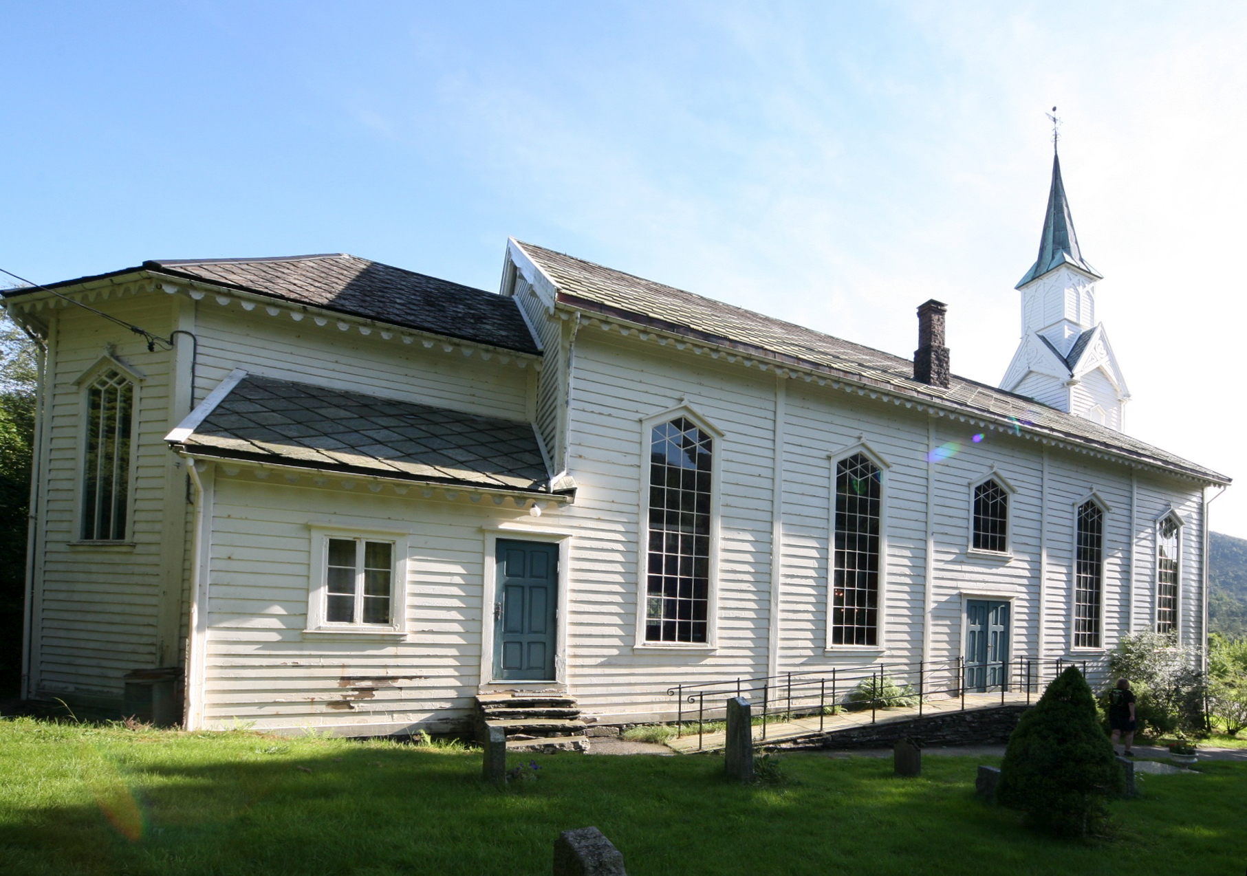 Gulen kirke Please credit this photo Nina Aldin Thune in the immediate vicinity of the image.